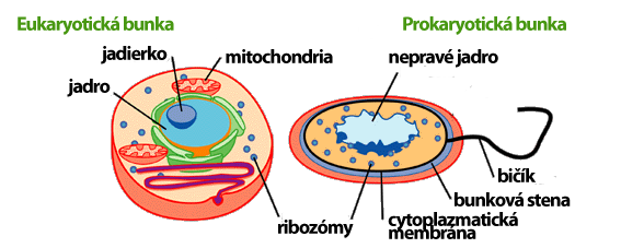 Obrázky mikroorganizmov